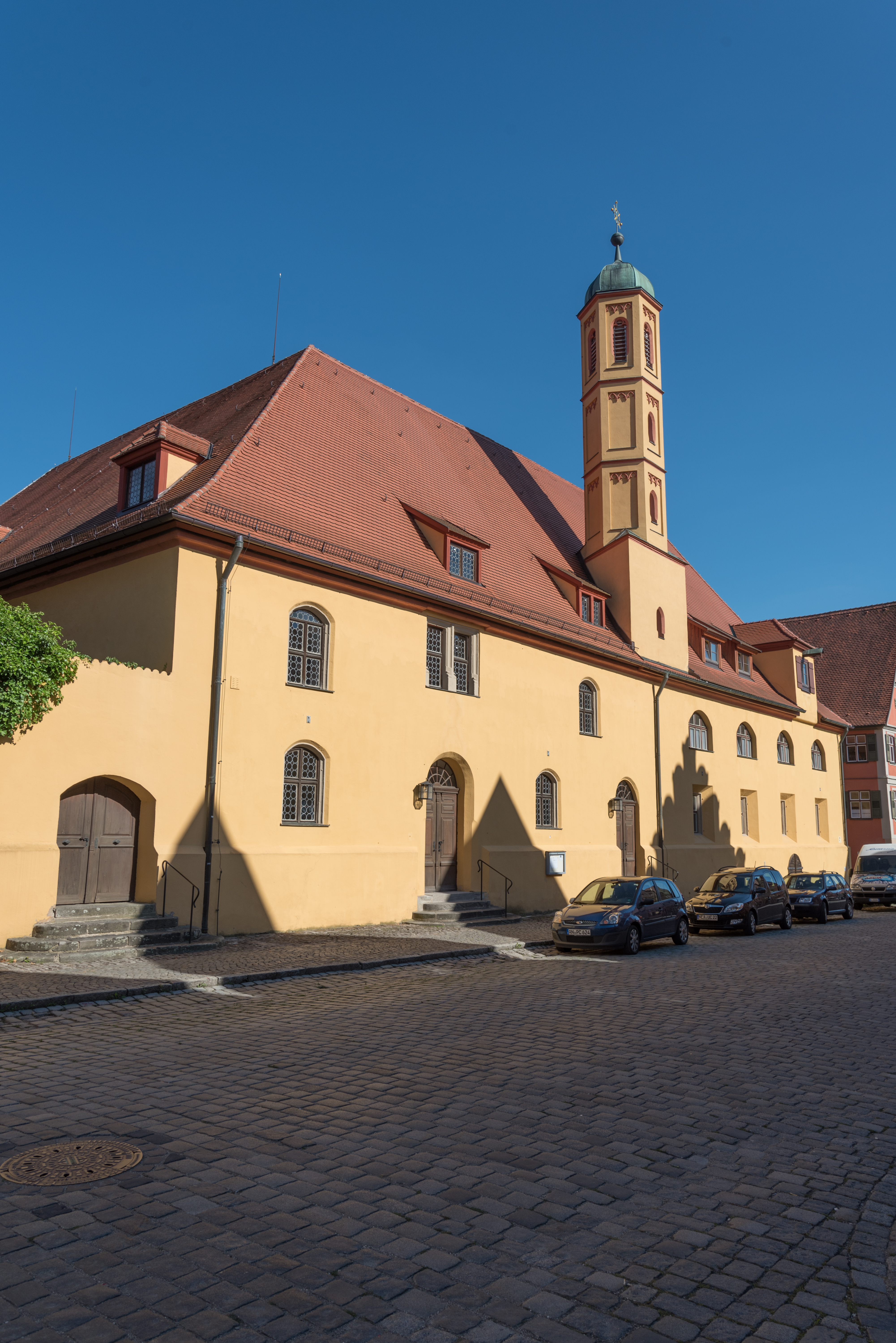 Dinkelsbühl, Dr.-Martin-Luther-Straße 6a